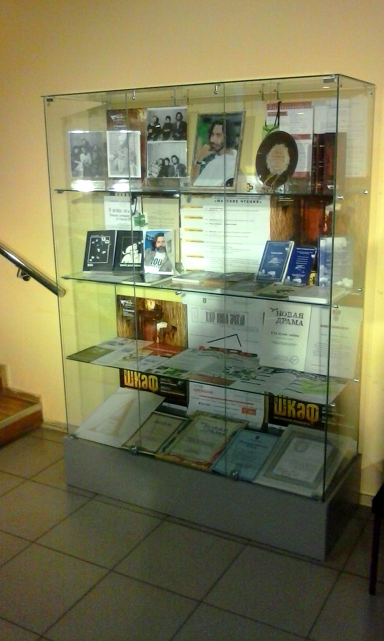 Экспозиция, посвященная творчеству Вадима Леванова. Молодёжный драматический театр. Тольятти. Россия